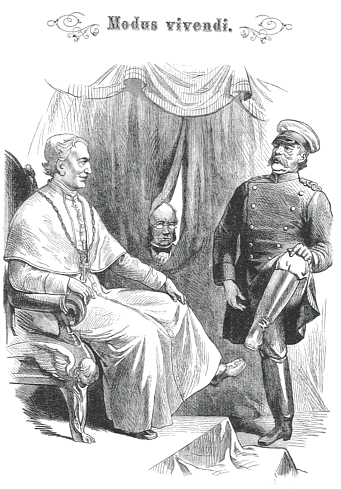 Karikatur „Modus vivendi“ aus dem Kladderadatsch, 1878. Die Bildunterschrift lautet: Pontifex: „Nun bitte, genieren Sie sich nicht!“ Kanzler Bismarck: „Bitte gleichfalls!“